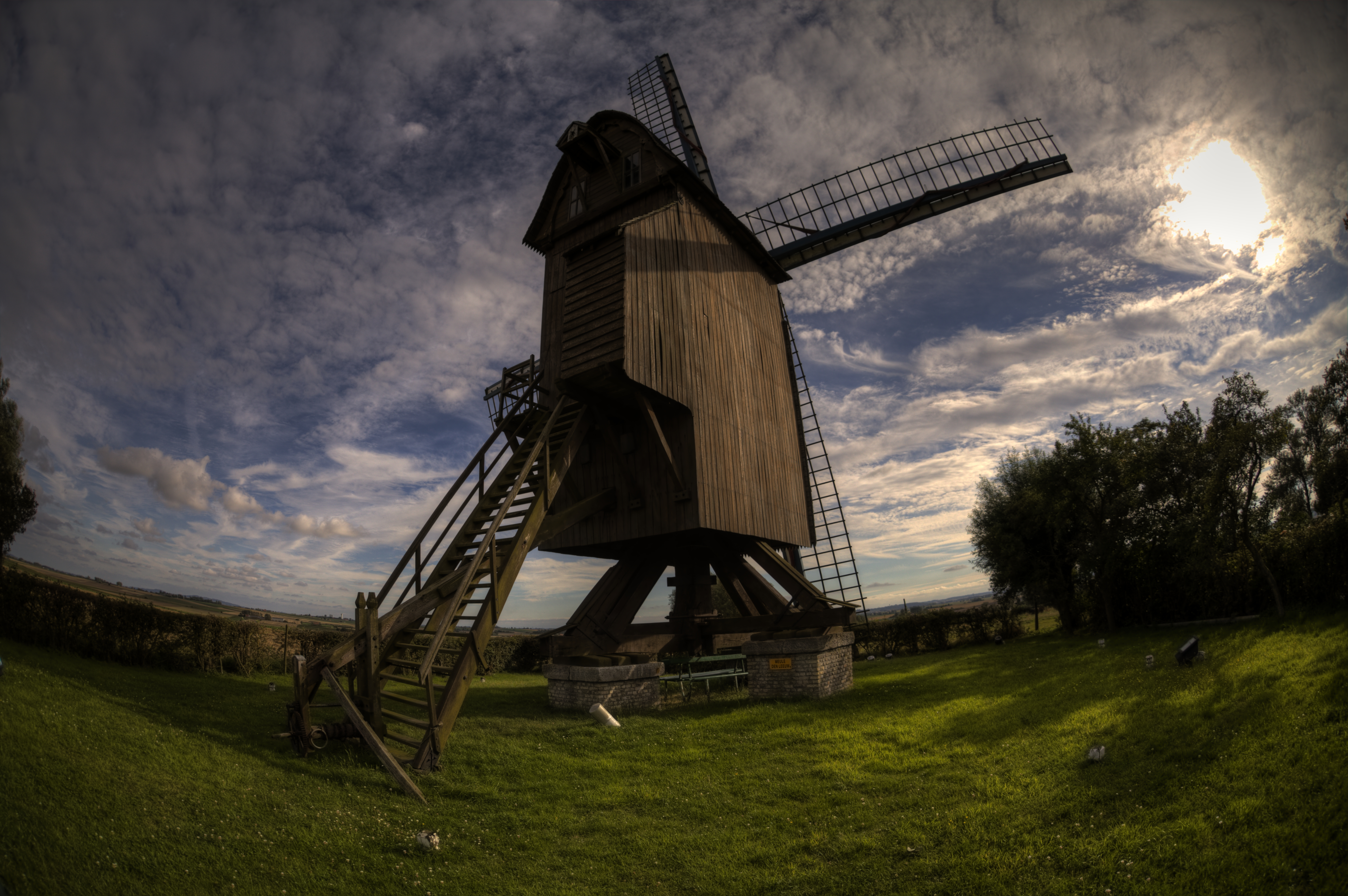 Moulin "Den Leuw" à Pitgam, situé sur la commune dont il porte le nom. Accessible depuis la route D110 .